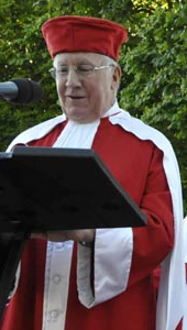 Jacques Bertrand présidant la jurade de Saint Emilion Unknown